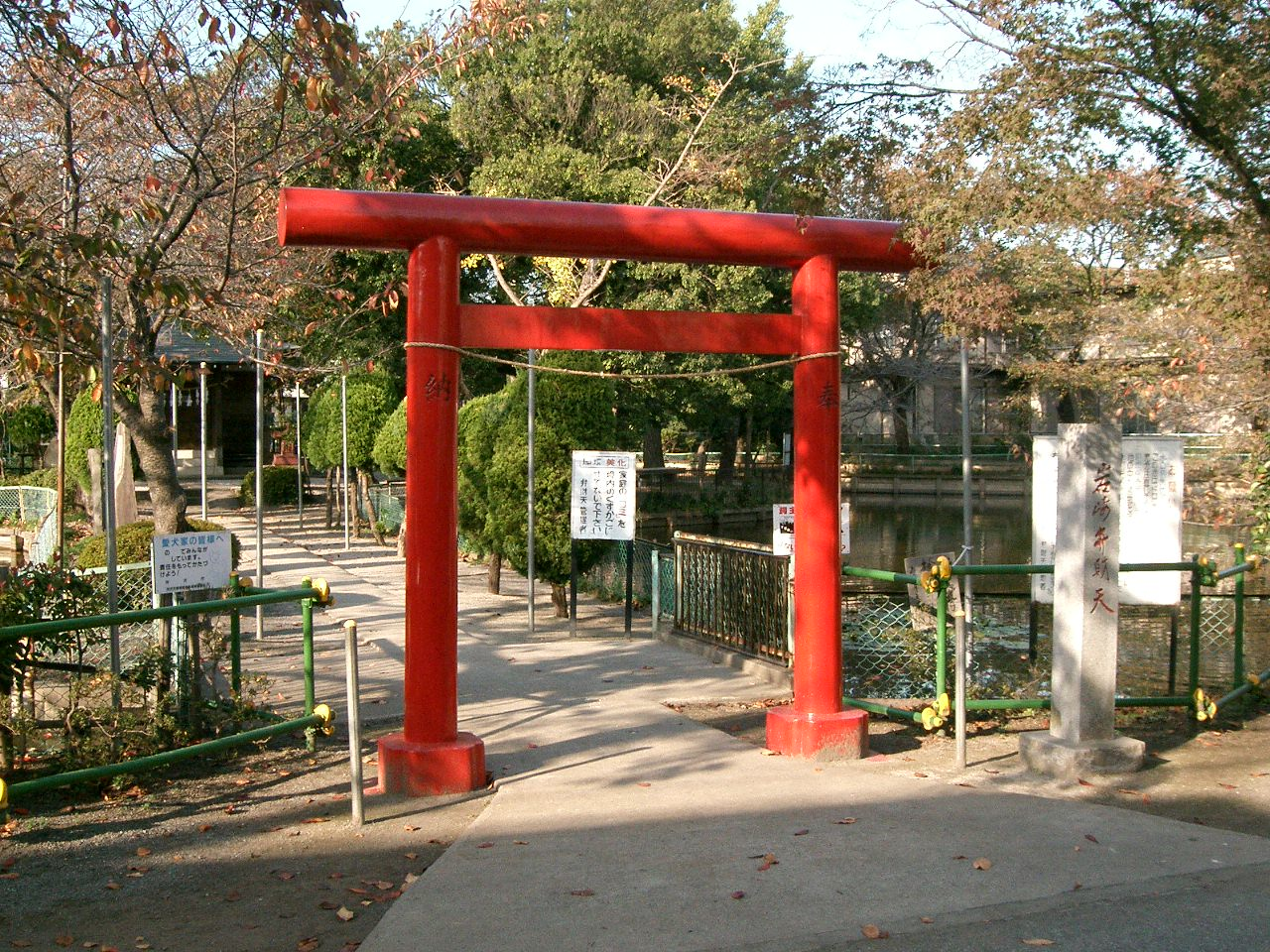 弁天池 （岩崎弁財天） - 所沢市山口